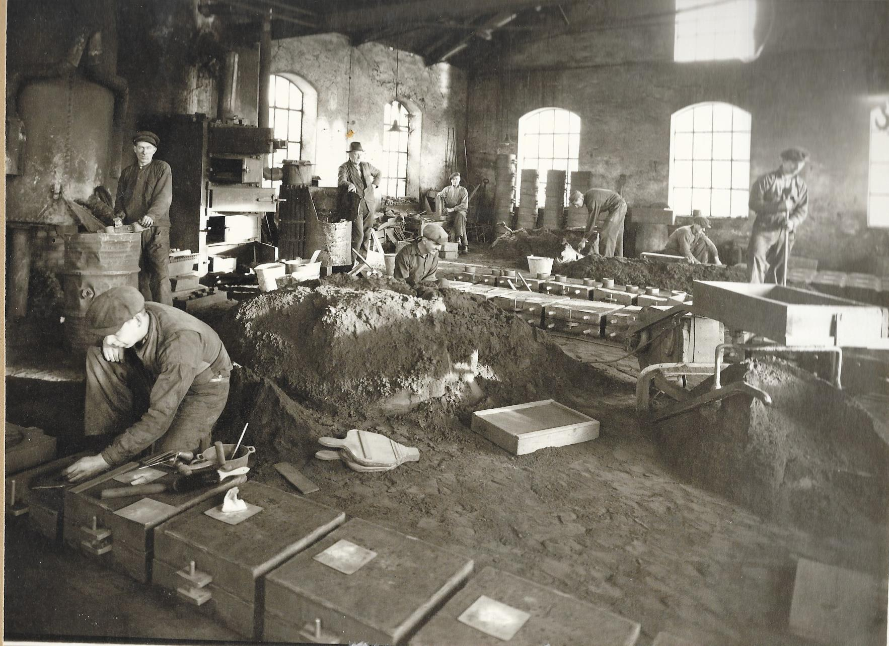 Bild tagen 1941, interiörbild från gjuthallen på Bröderna Sandbergs Gjuteri. På bilden längst till vänster syns Philip Sandberg.